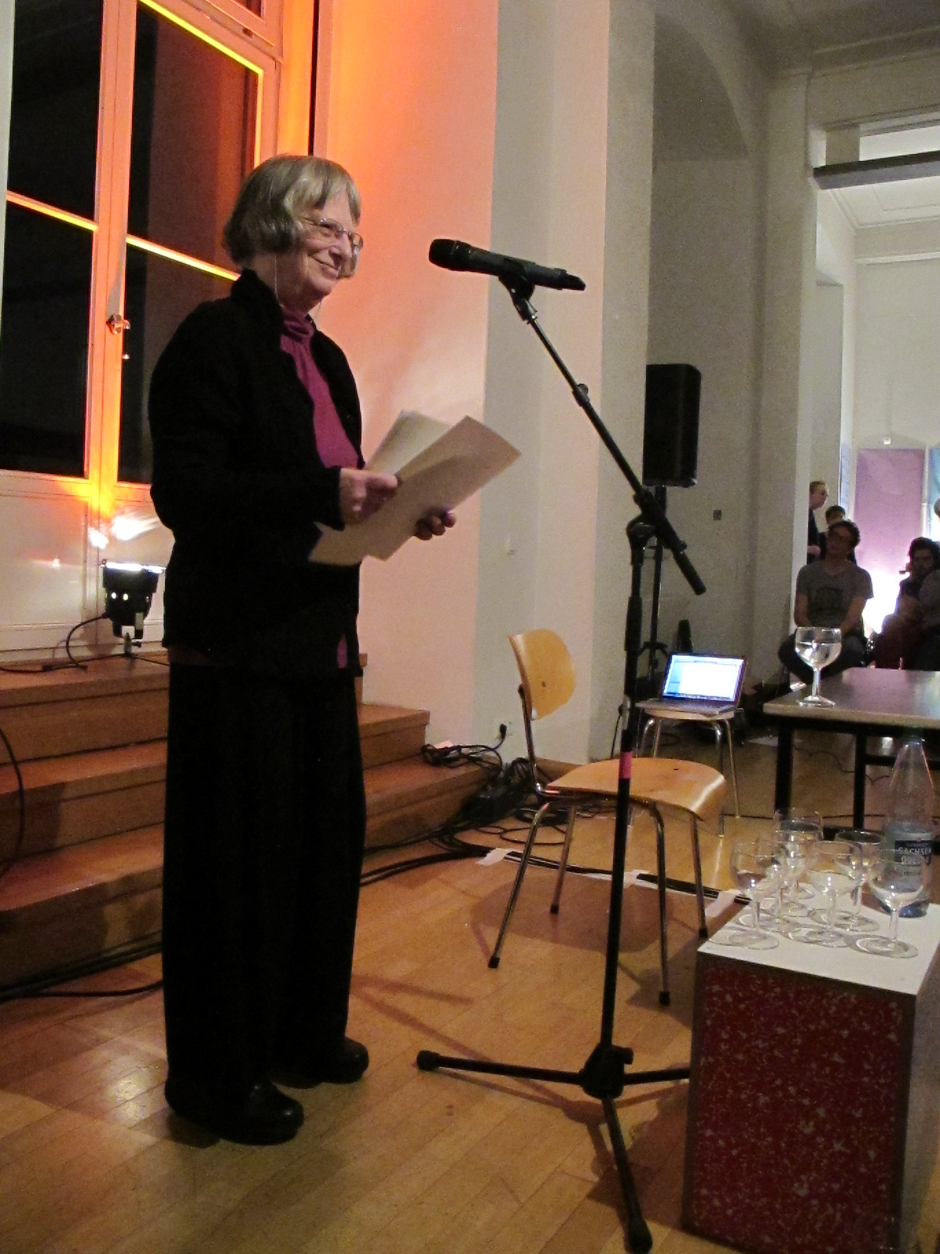 Leipziger Buchmesse 2014, Elke Erb